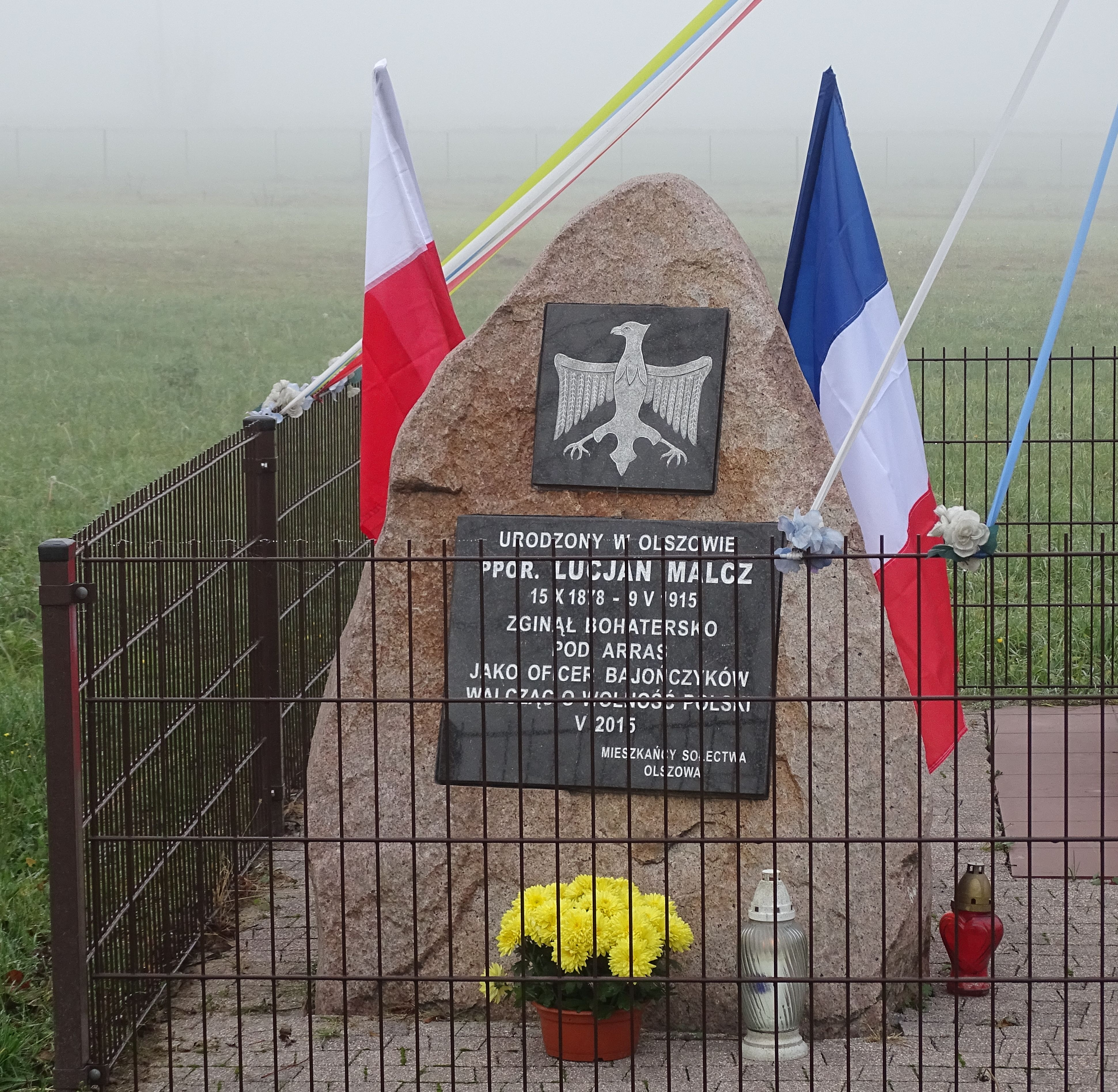 Pomnik Lucjana Malcza we wsi Olszowa odsłonięty w 100-lecie bitwy pod Arras, maj 2015